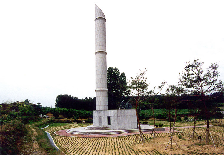 사적 제406호 장성 황룡 전적 (長城 黃龍 戰蹟)